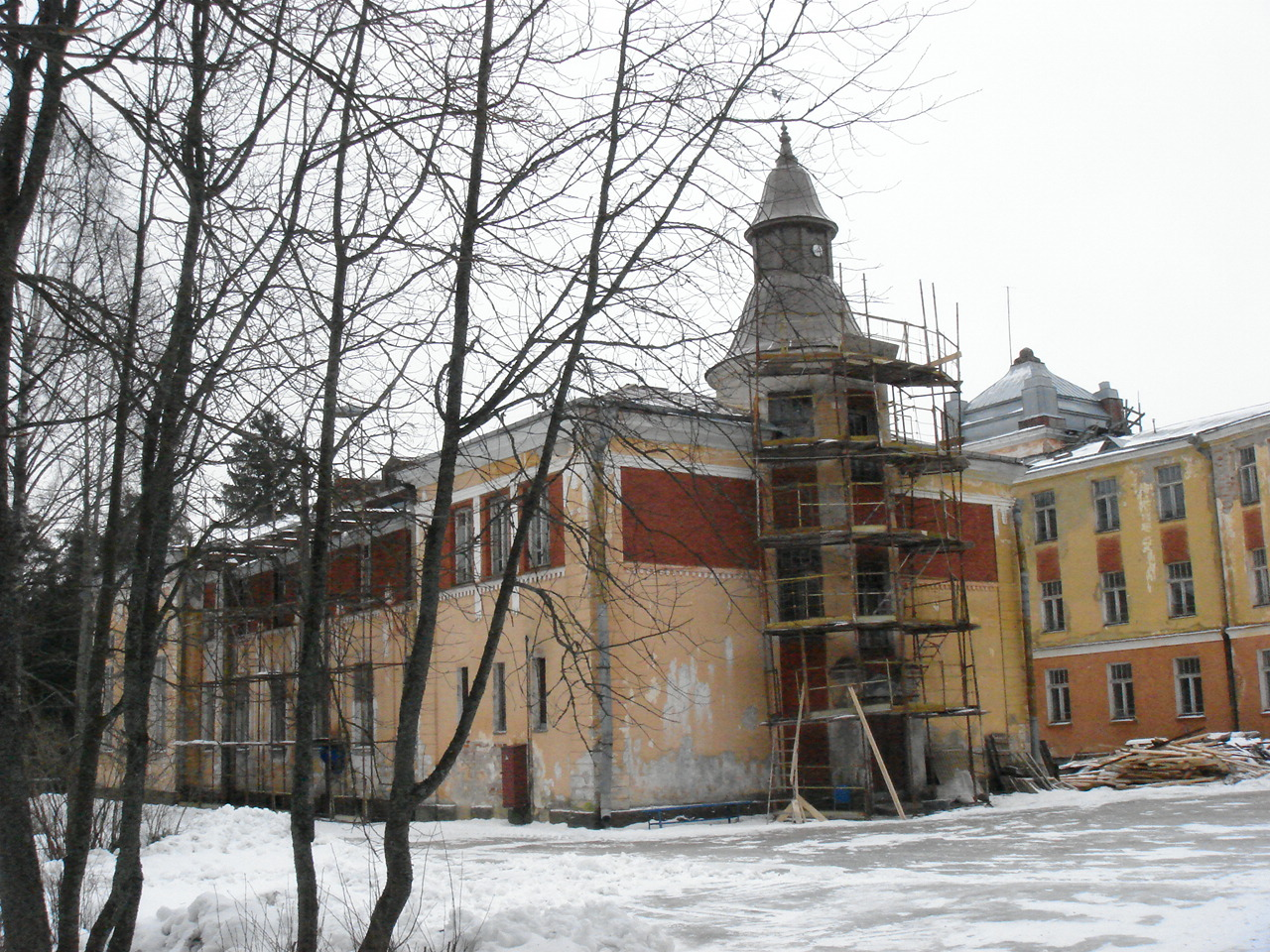 Санаторий "Халила", в котором в декабре 1917 года отдыхал В.И. Ленин (Санкт-Петербург и Лен.область,Выборгский район, посёлок Сосновый Бор)